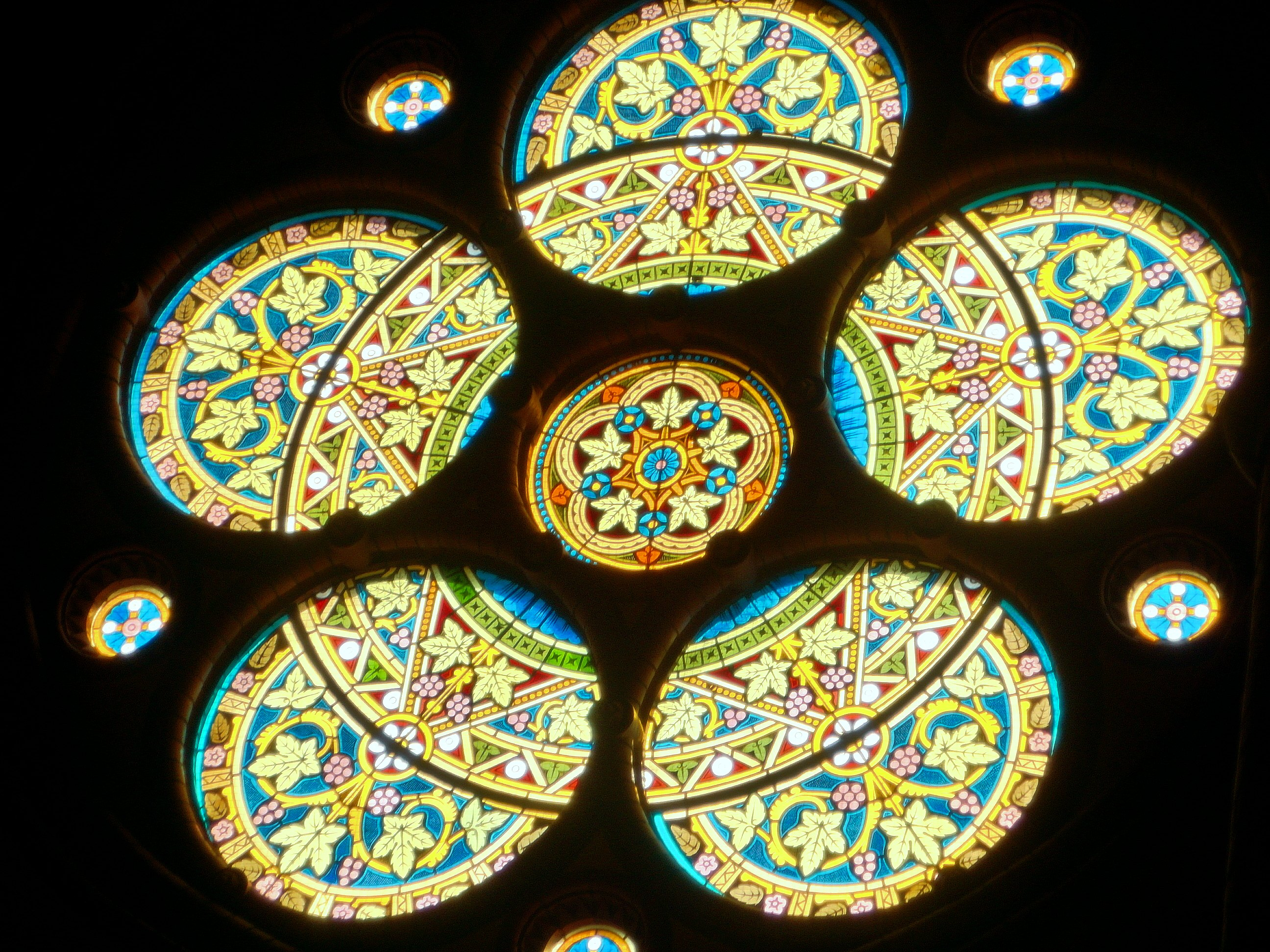 farbige Glasfenster-Rosette aus der Werkstatt von Maximilian Auerbach